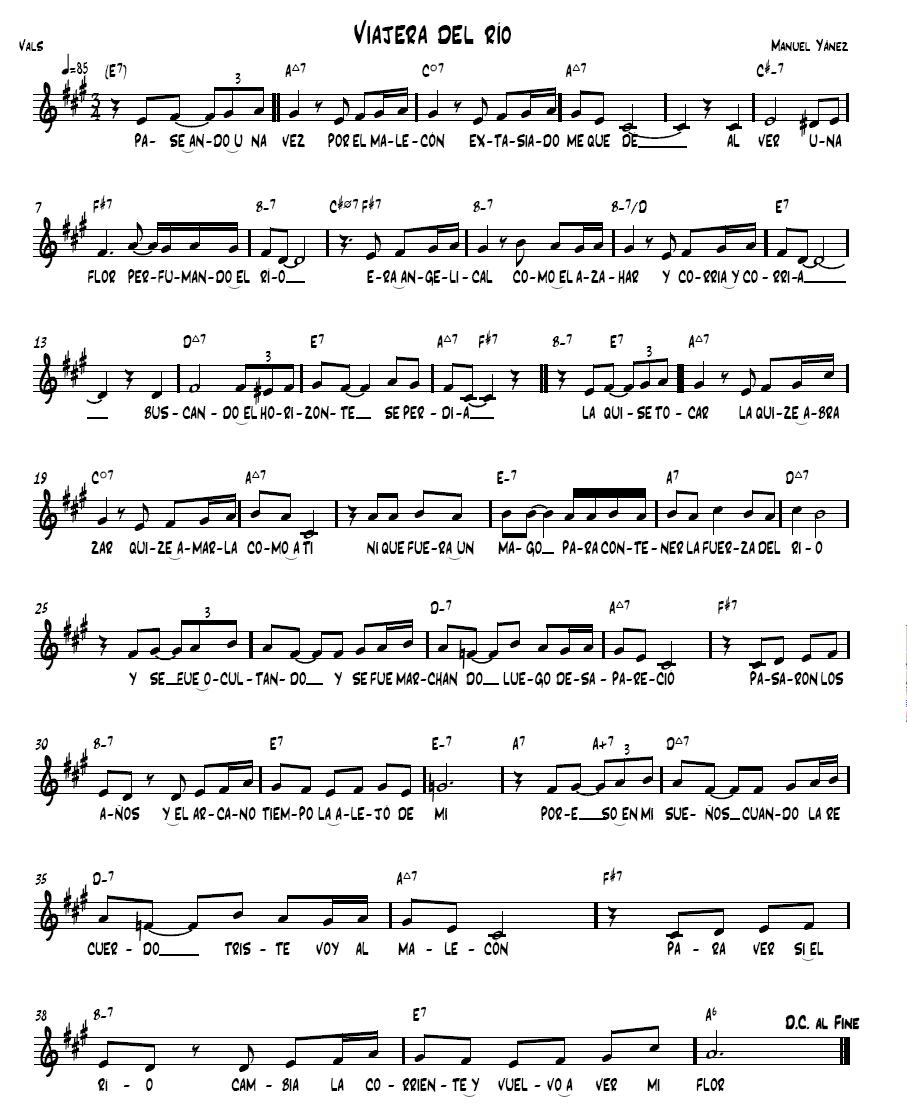 Partitura de Viajera del Río Valse venezolano del conpositor Manuel Yánez.